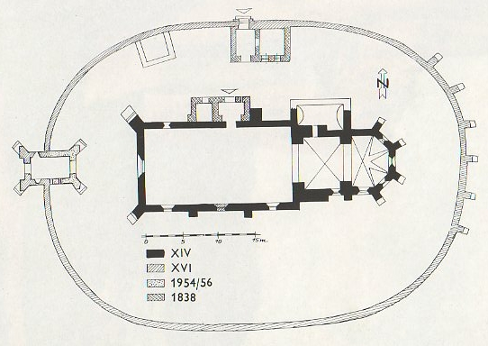 Planul fortificatiei din Tapu.